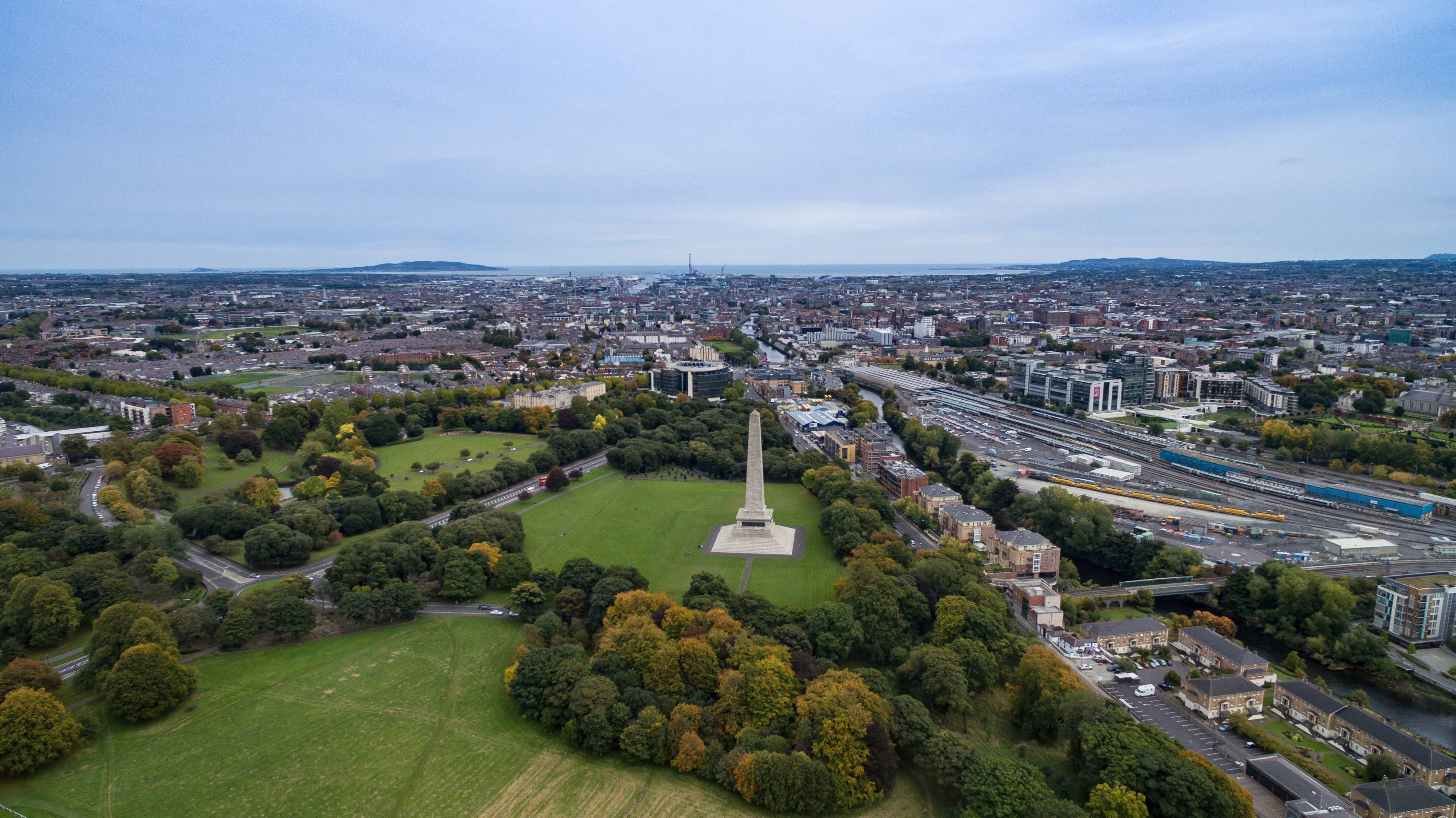 Ein toller Blick aus dem Phoenix Park Richtung Küste.